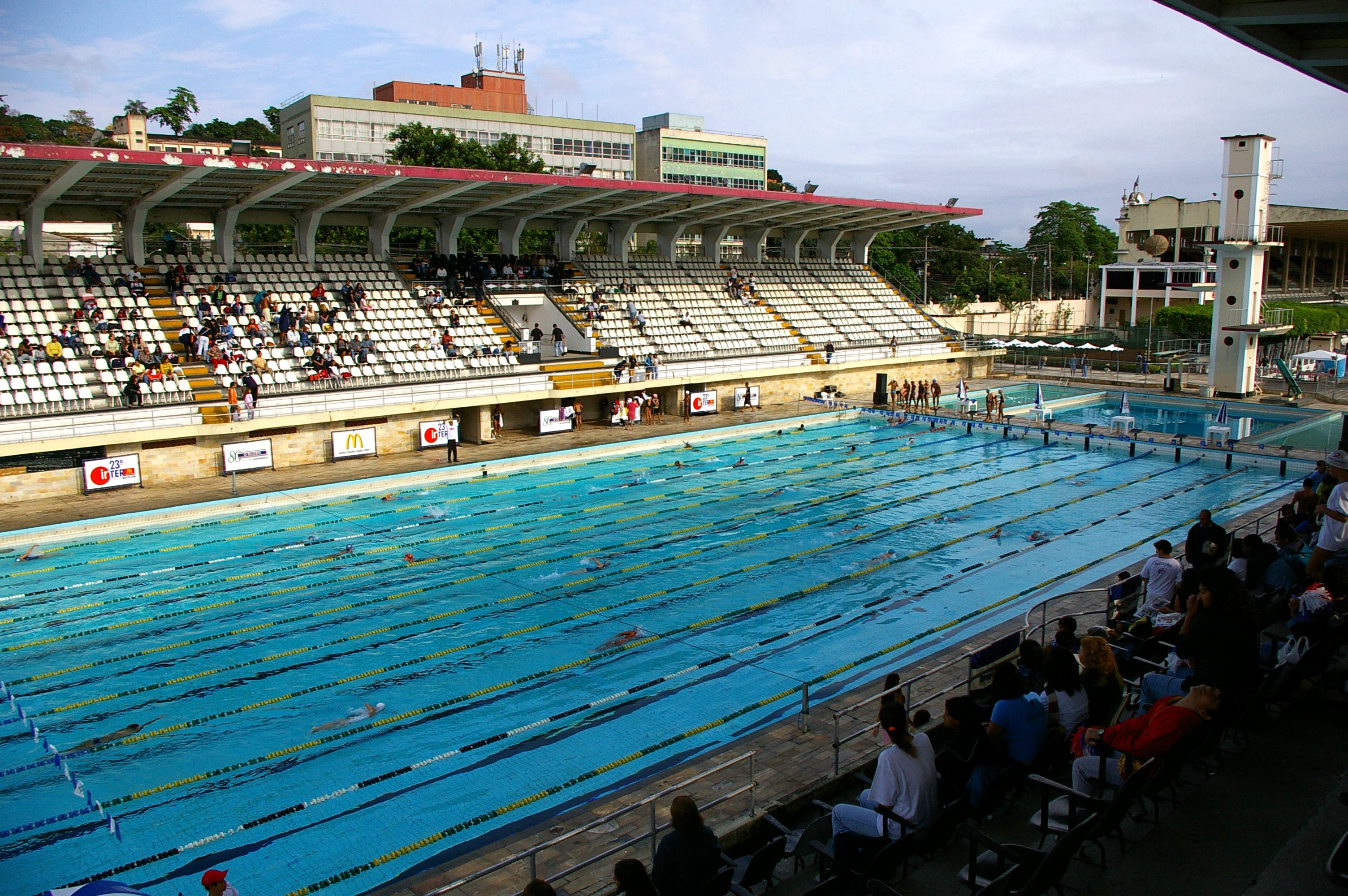 Parque Aquático do Club de Regatas Vasco da Gama (18 de setembro de 2005) Foto por Lucio Luiz